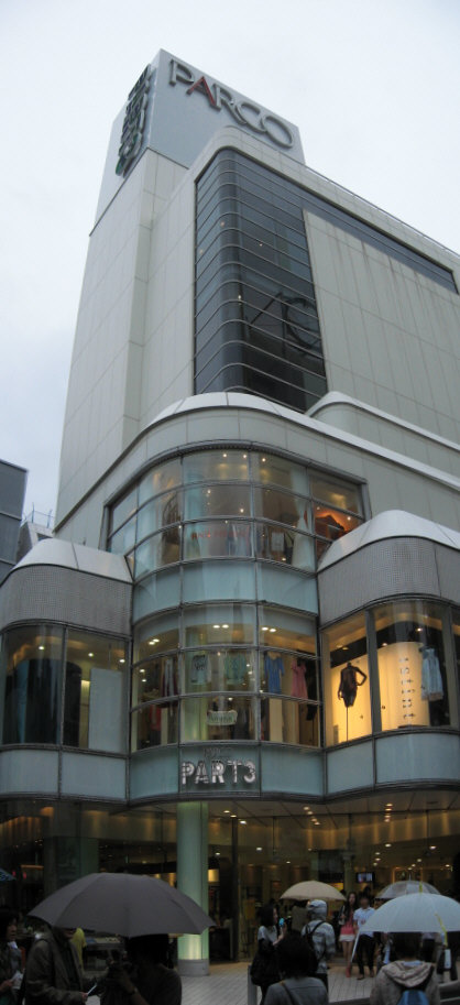 渋谷PARCO PART-3。2008年5月5日に東京都渋谷区にて撮影の写真2枚をPhotostichにて合成